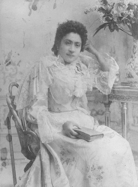 Doctora Eloísa Díaz Insunza en 1900